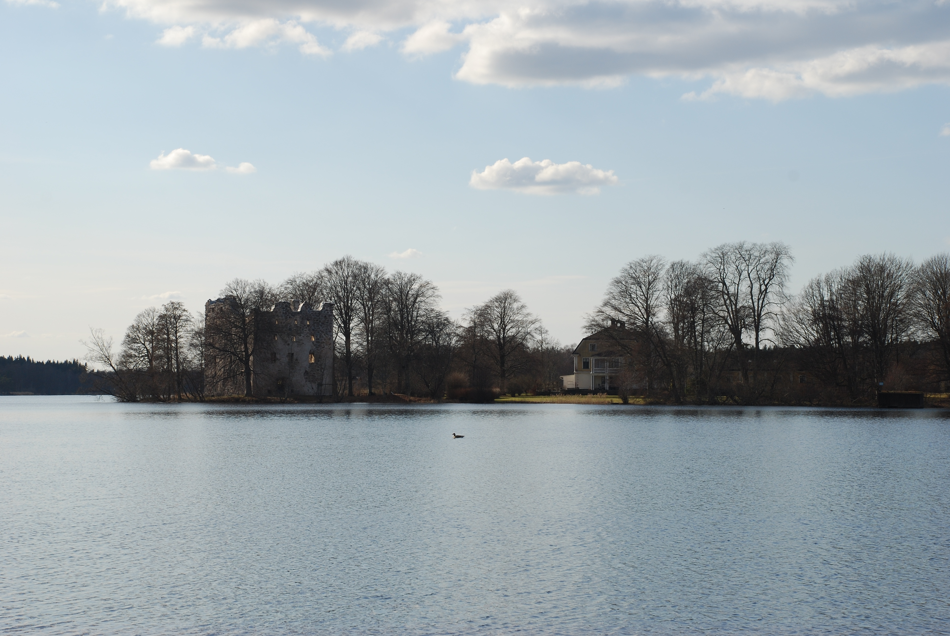 Slottsruinen och herrgården på Bergkvara